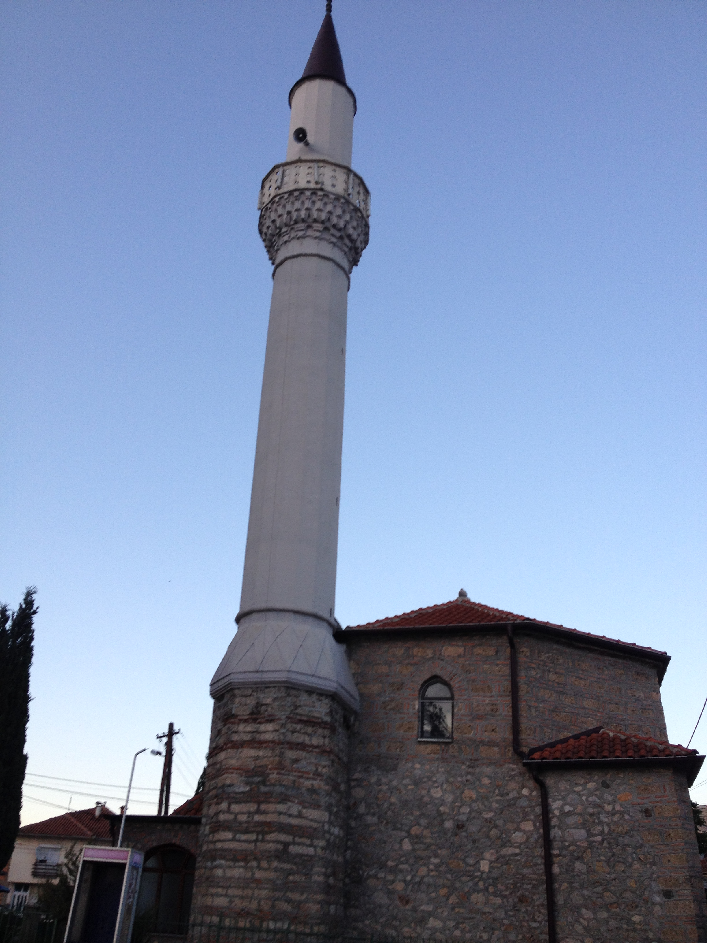 Die Hadschi-Durgut-Moschee in Ohrid, Mazedonien